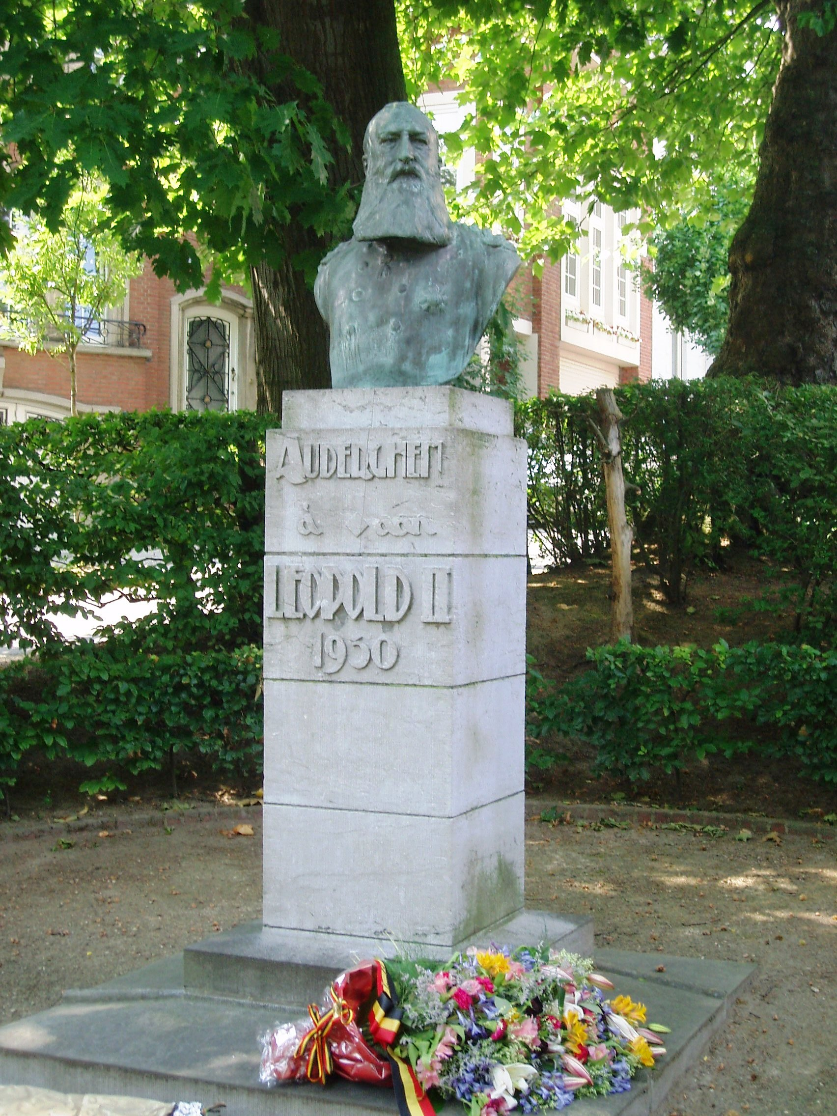 Leopold II statue Auderghem Belgium